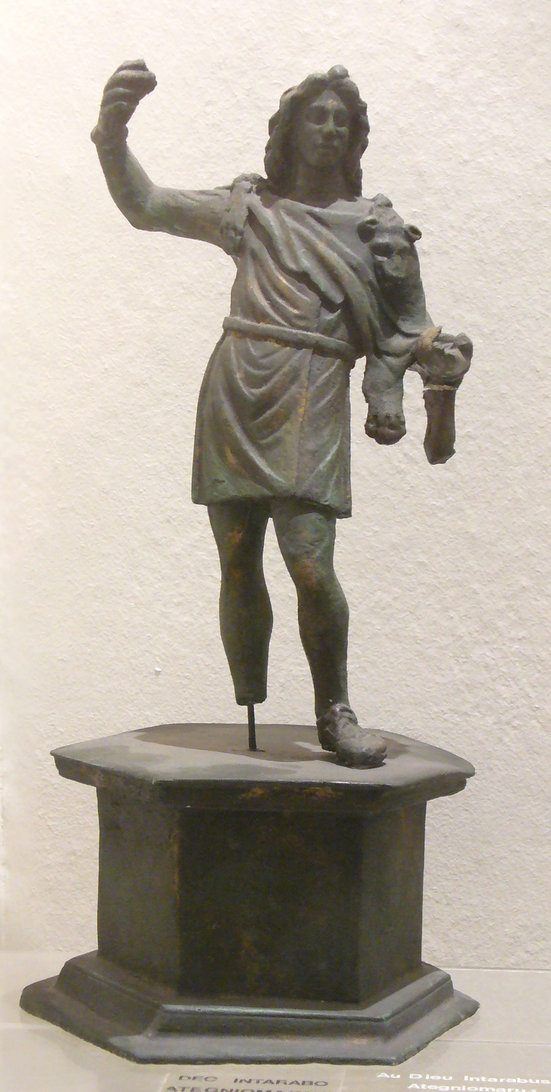 Statuette bronze du dieu Intarabus.